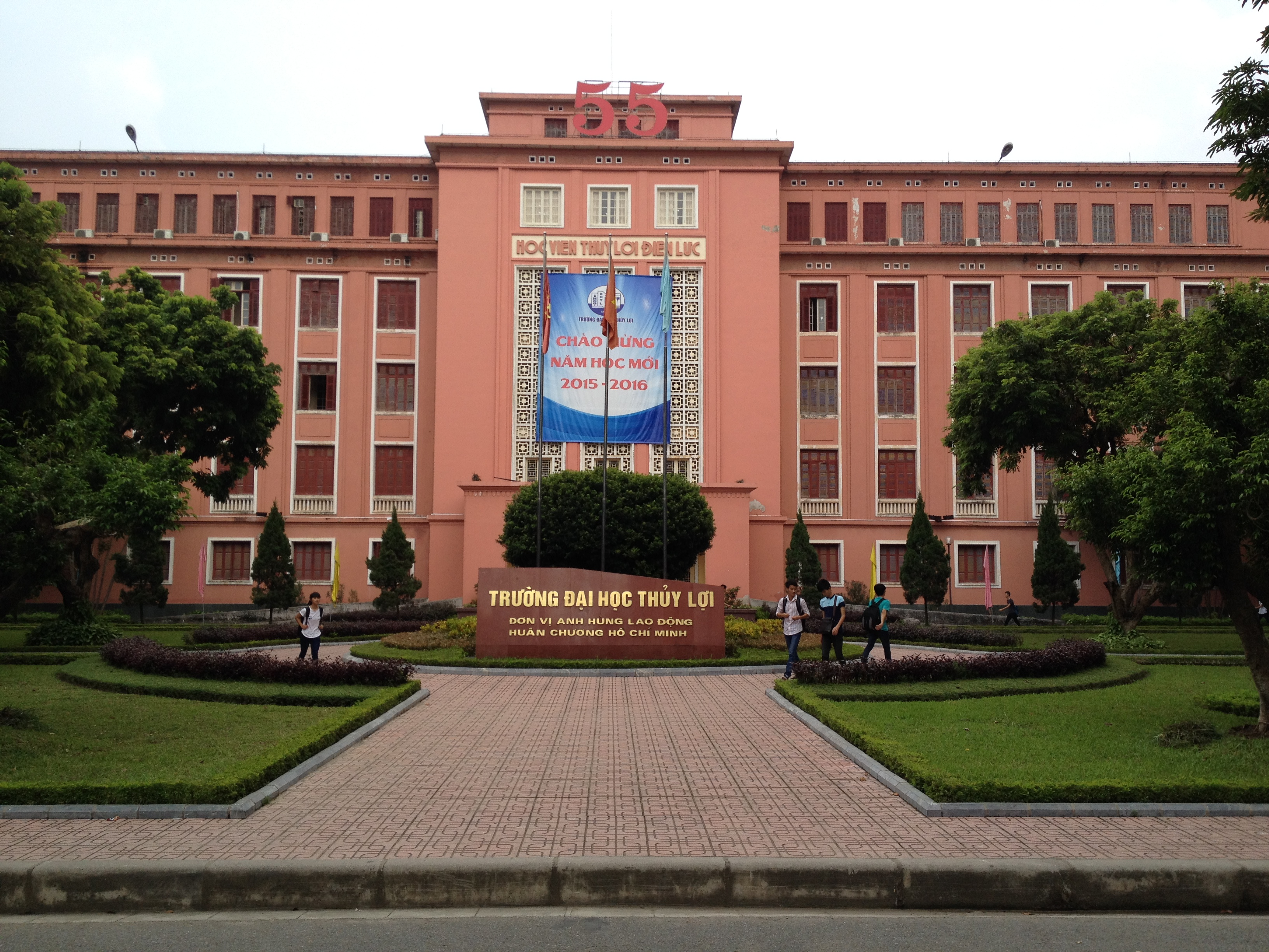 Đại học Thuỷ Lợi, Hà Nội, Việt Nam.